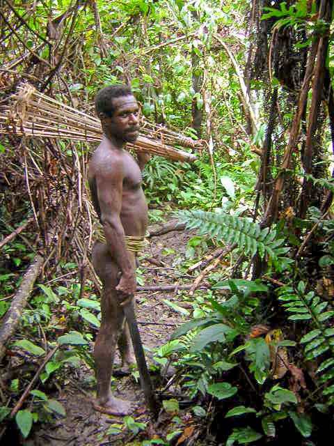 Hombre de la tribu de los Korowai